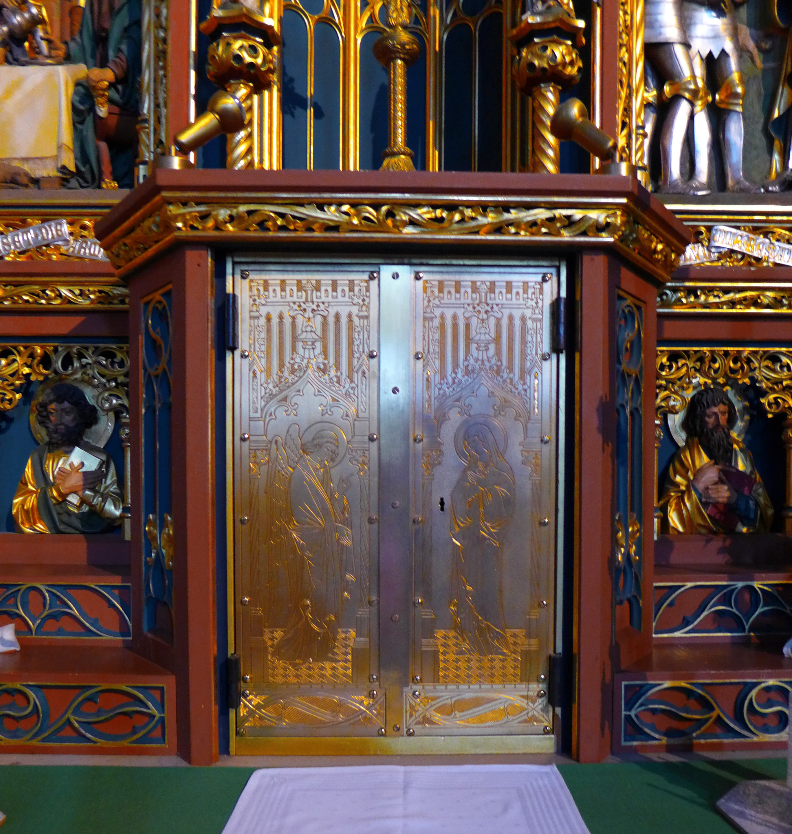 St. Ludwig (Saarlouis), Tabernakeltüren mit der Darstellung des englischen Grußes